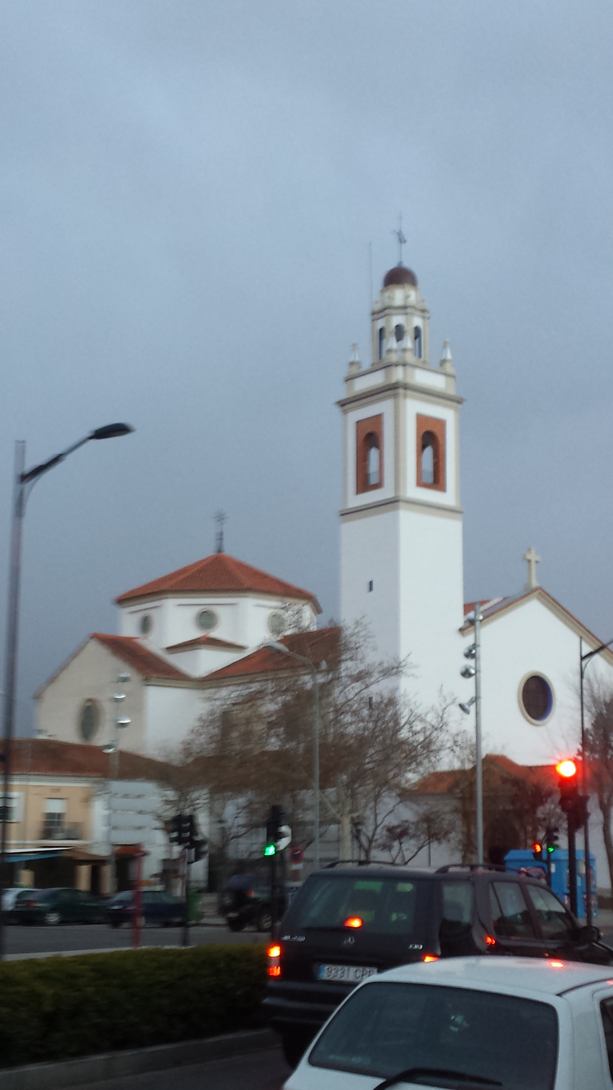 Iglesia de Fátima. Albacete